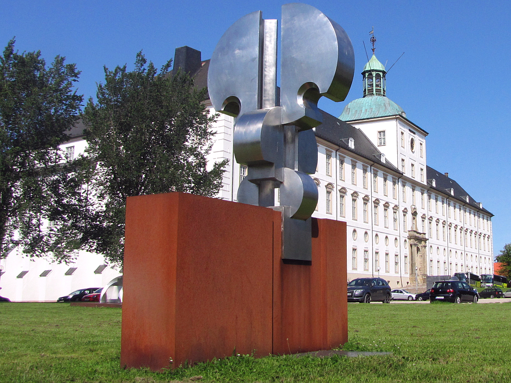 Schloss Gottorf mit der Skulptur am Südflügel: "Großer Mauerreiter" aus 1980 von Jörn Pfab - Foto 2011 Wolfgang Pehlemann IMG_1708